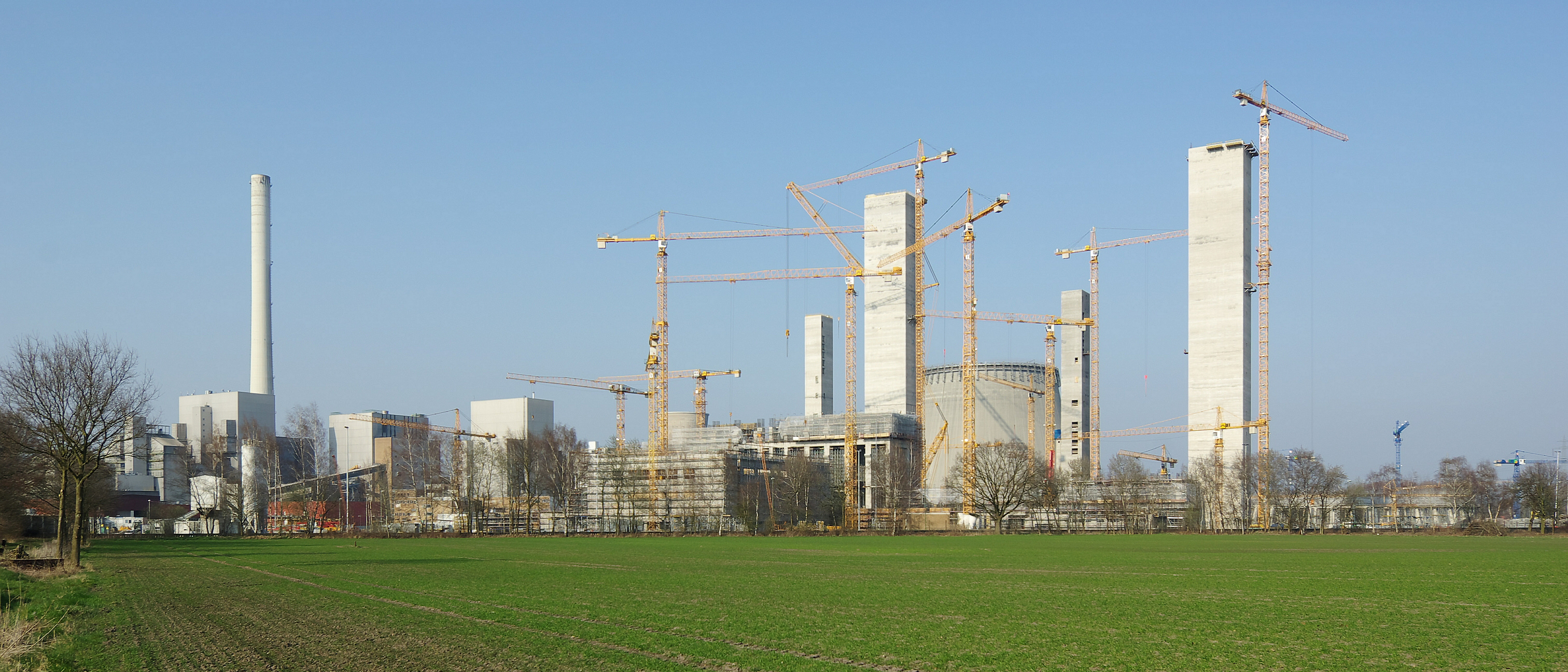 Kraftwerksbaustelle in Hamm-Uentrop